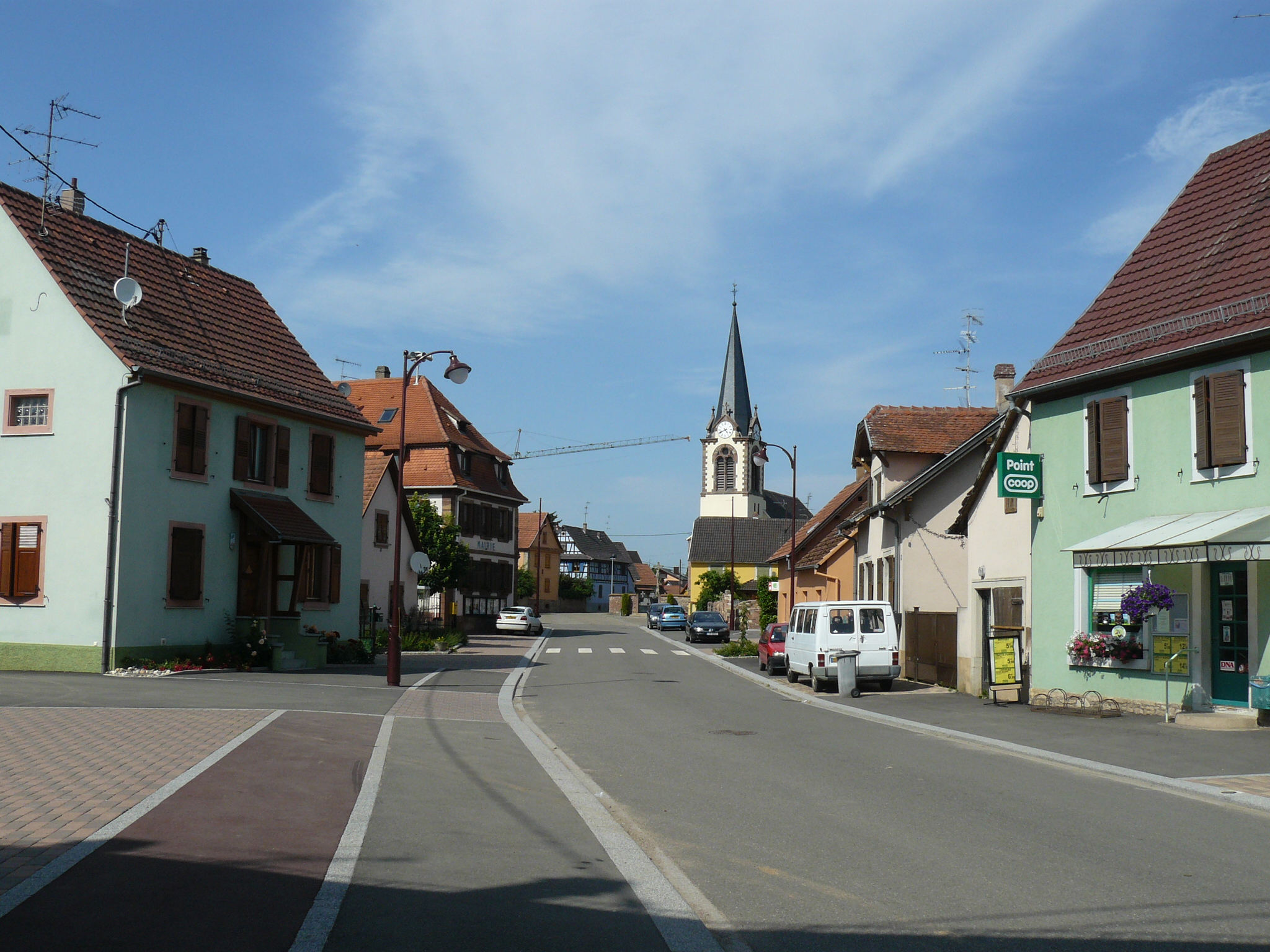 L'artère principale du village d'Innenheim